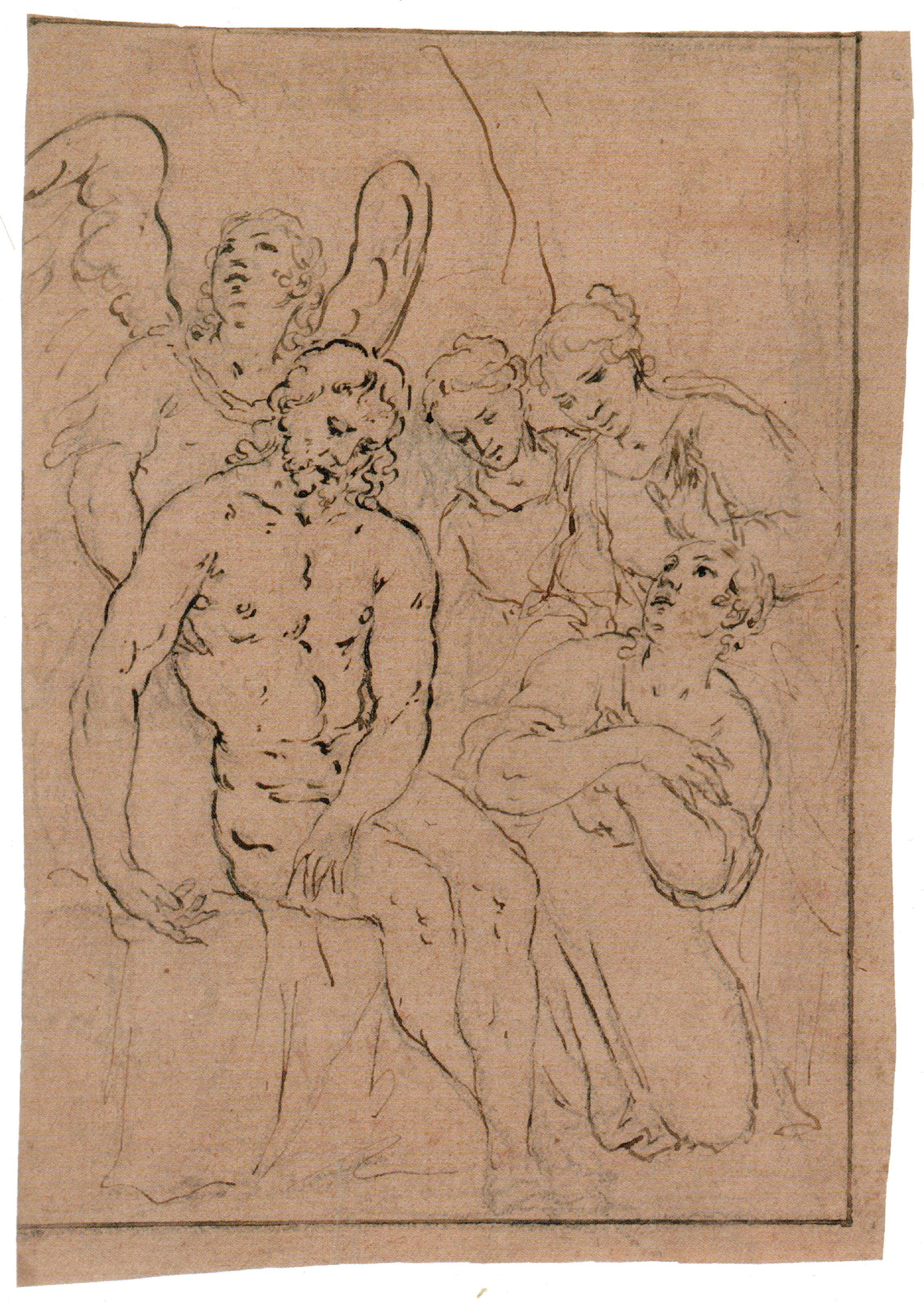 Crtež je atribuiran Battisti del Moru Kabinet grafike Hrvatske akademije znanosti i umjetnosti